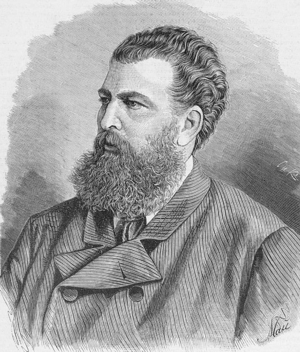 Голицын Юрий Николаевич, дирижёр и композитор